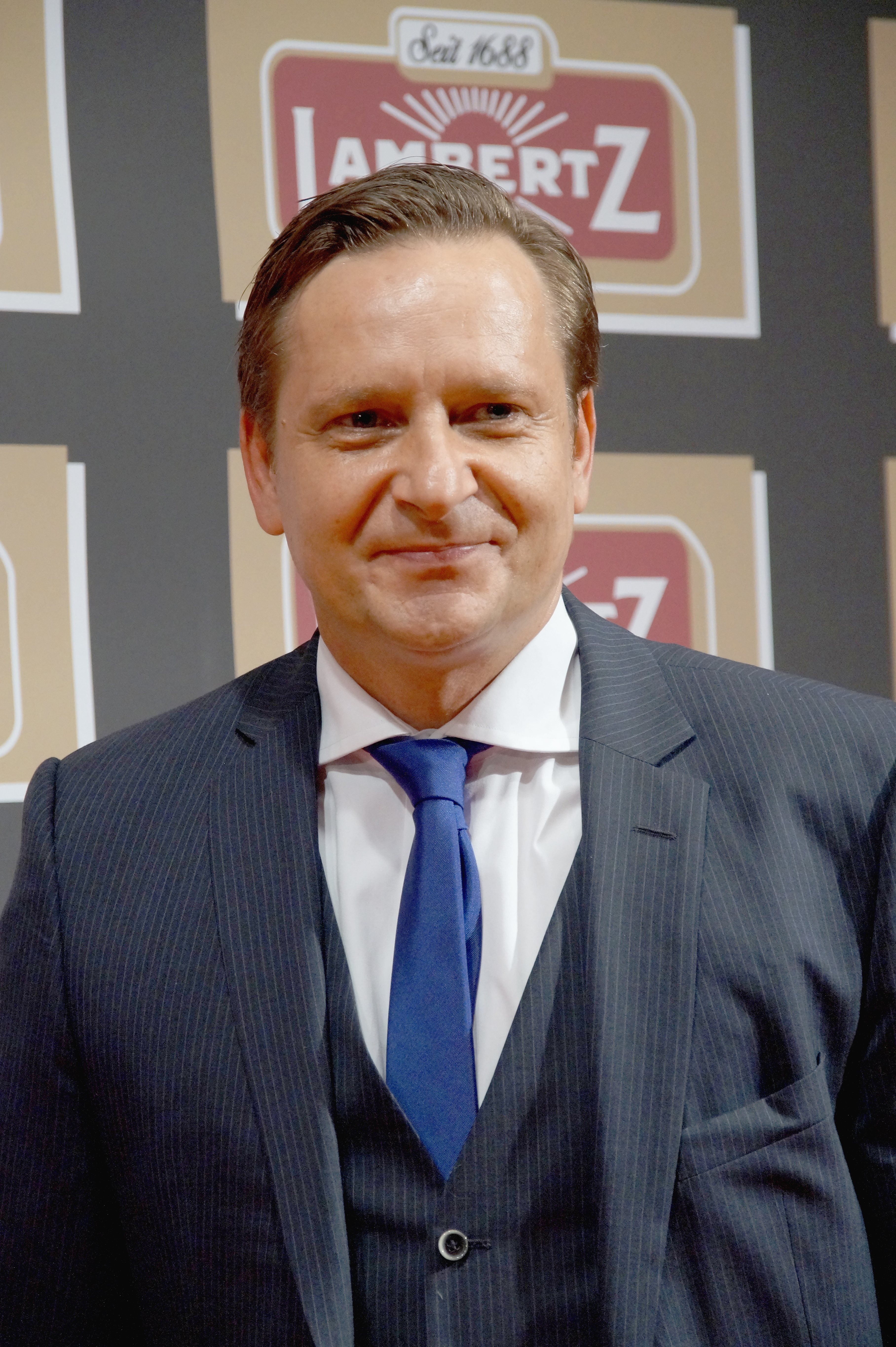 Horst Heldt bei der Lambertz Monday Night, im Februar 2016.